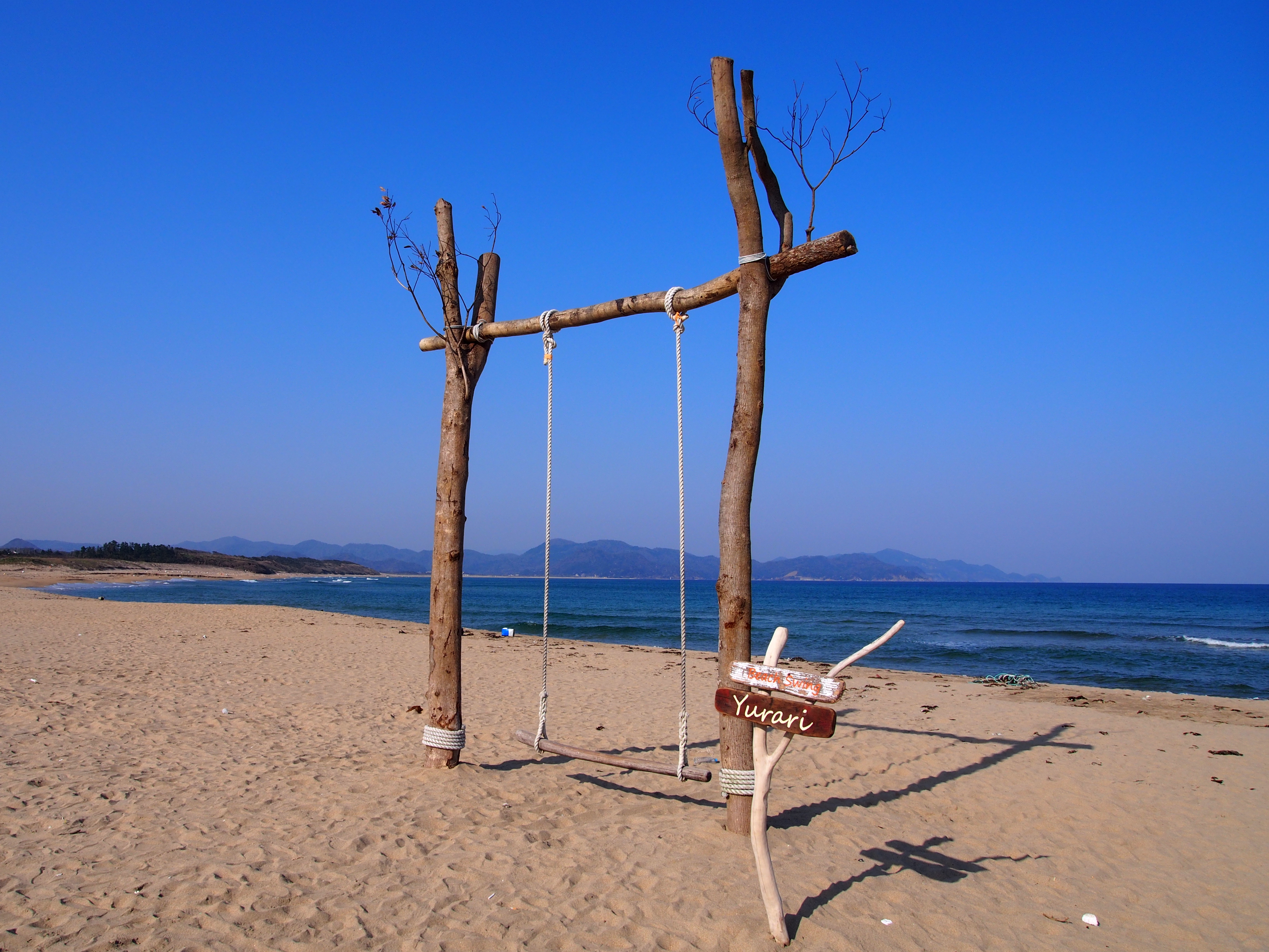 ビーチブランコゆらり 夕日ヶ浦海岸、京都府京丹後市網野町浜詰